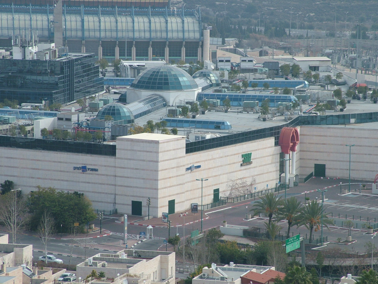 Malha mall, Jerusalem, Israel